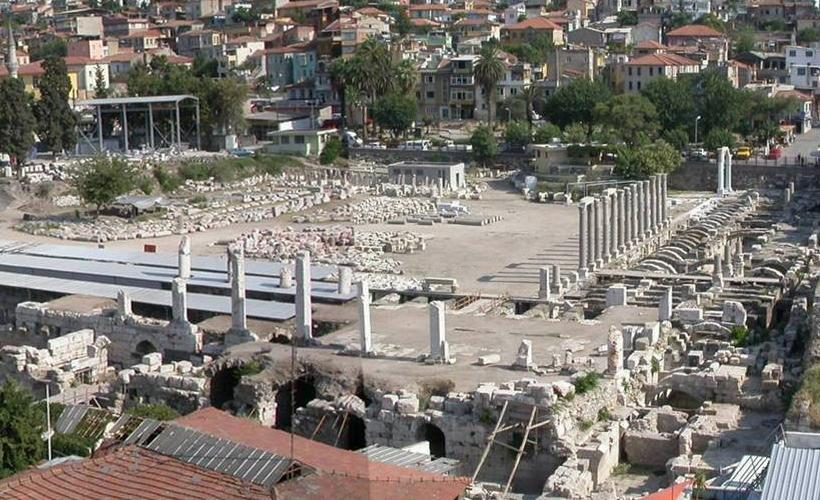 vue générale de l'Agora de Smyrne depuis le nord.